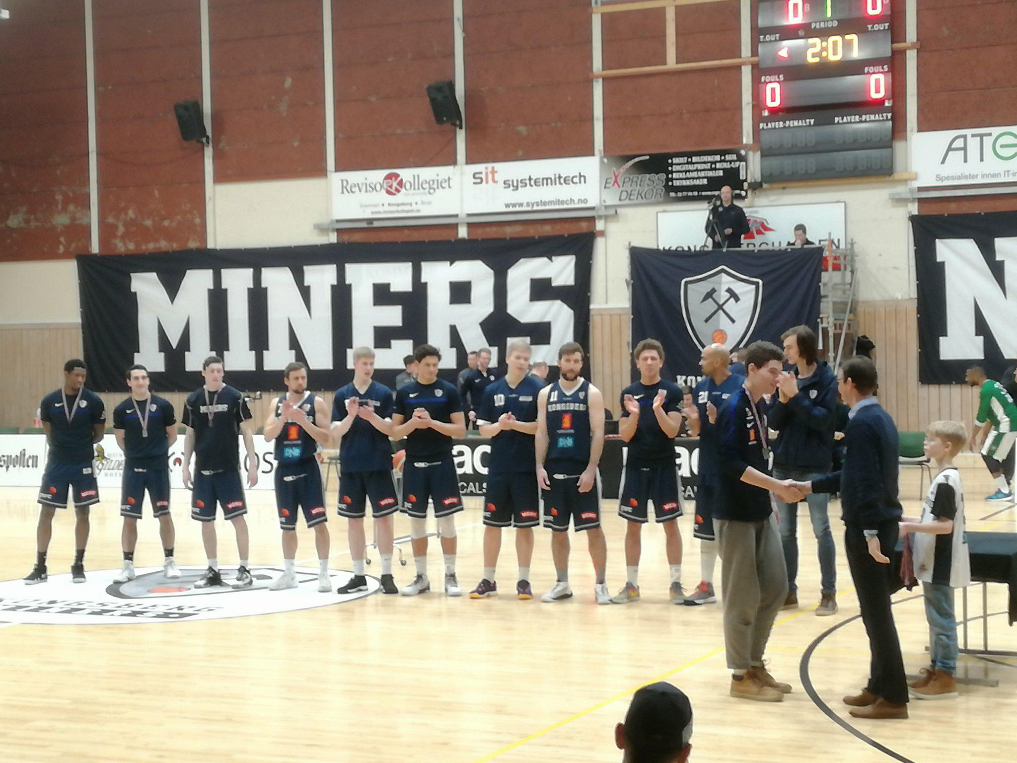 Kongsberg Miners. Kongsberghallen 15.2.2018. Mottar sølvmedaljer for grunnserien 2017/2018